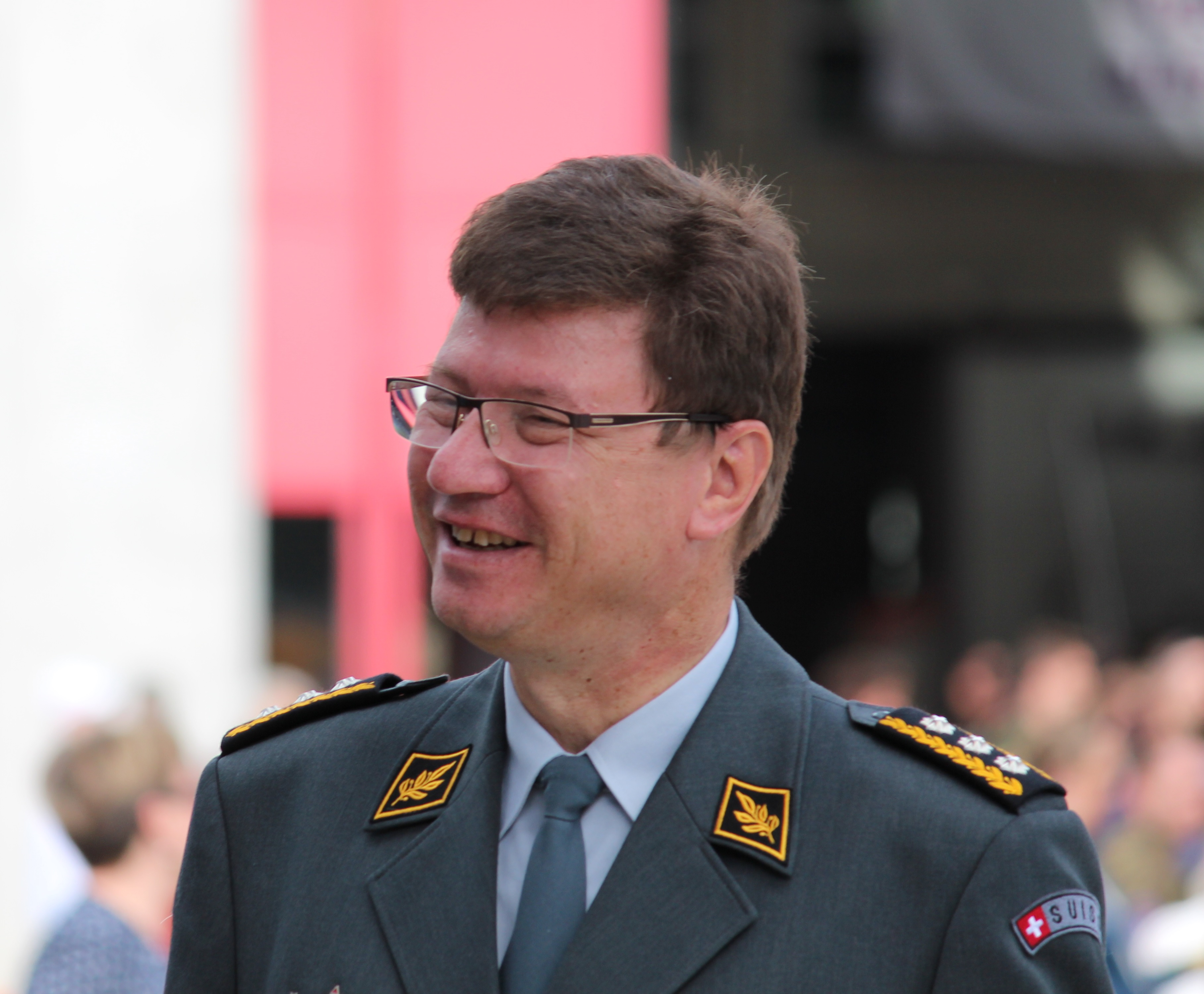 Aldo C. Schellenberg anlässlich des Jubiläums 75 Jahre Militärflugplatz Alpnach